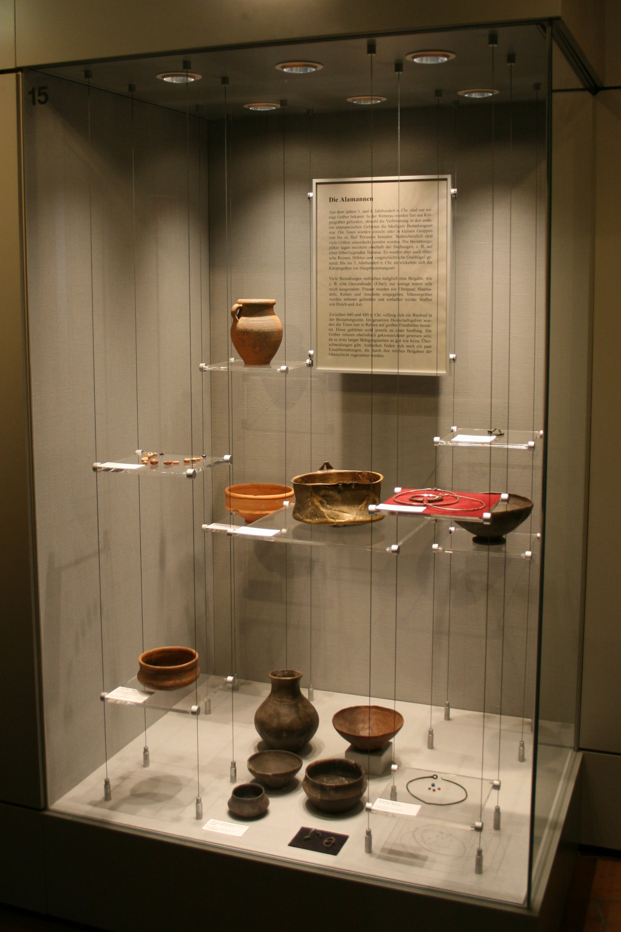 Alamannische Funde aus der Wetterau im Wetterau-Museum in Friedberg.